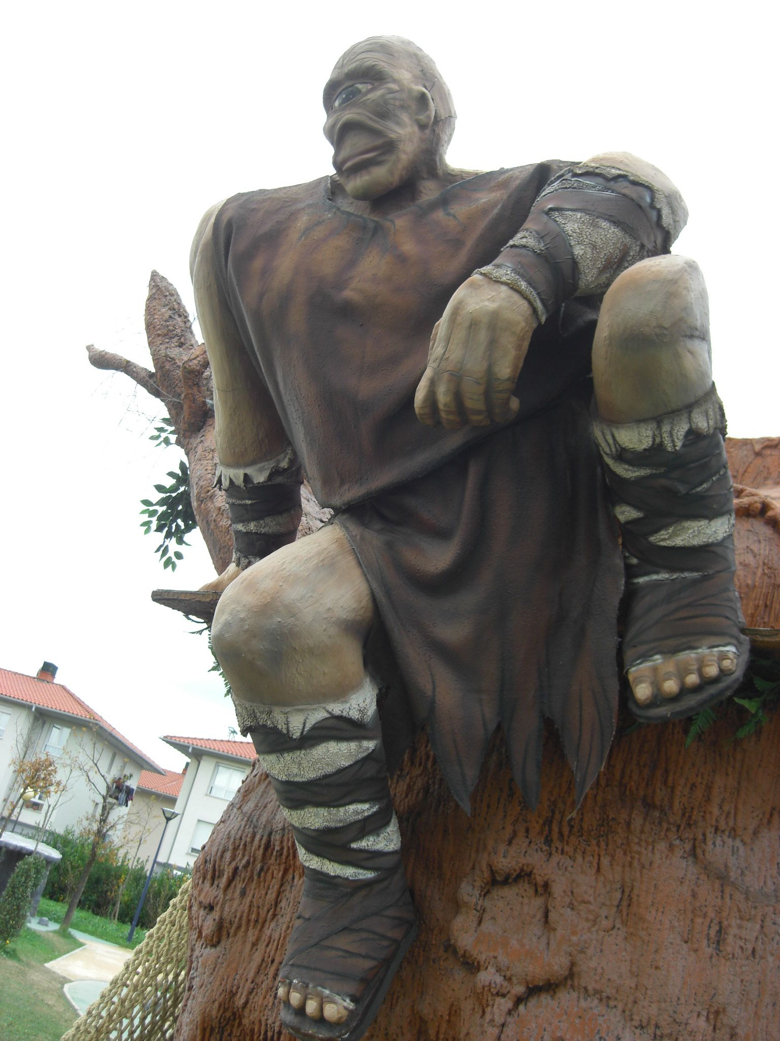 Tartaloren irudikapena, Zamudioko Izenaduba parkean.